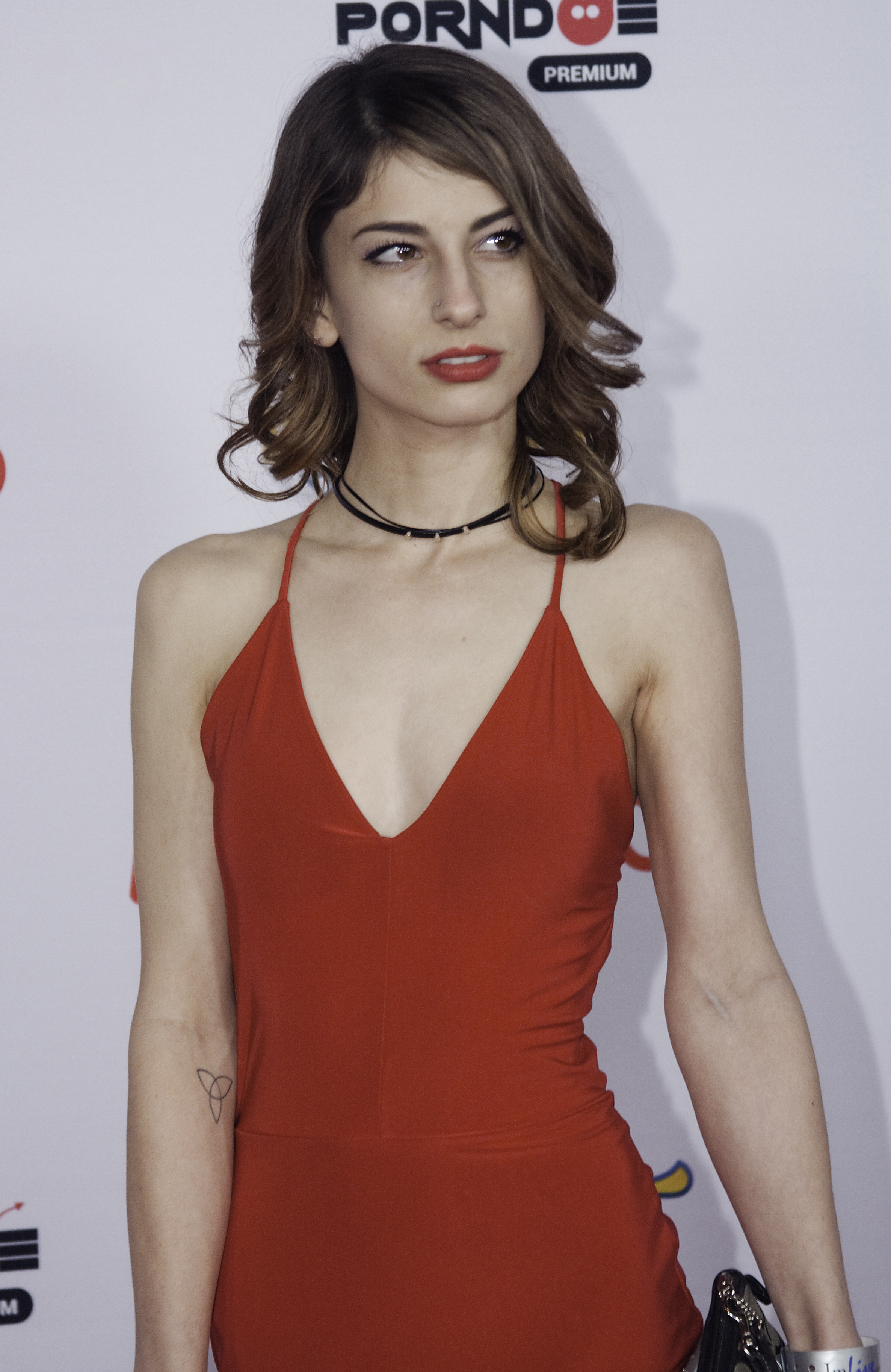 AVN16_0046bas